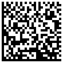 Data Matrix, encodant le text: Wikipédia, l'encyclopédie libre